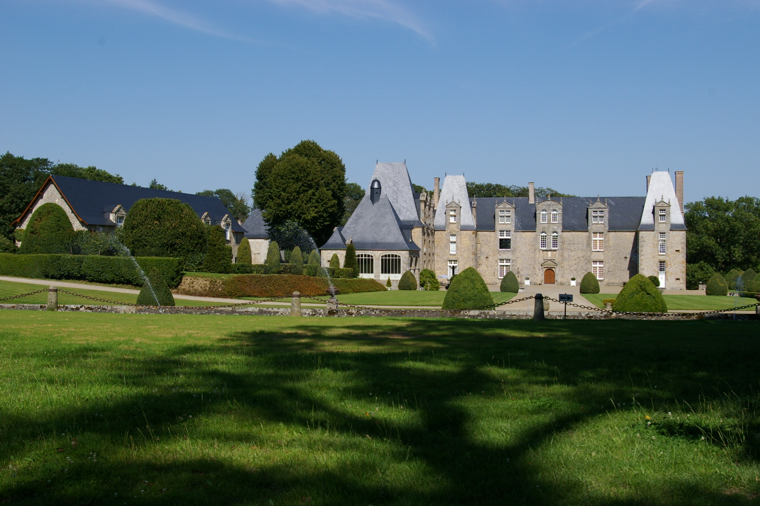 Château de la Roche-Pichemer, Saint-Ouën-des-Vallons (Mayenne)